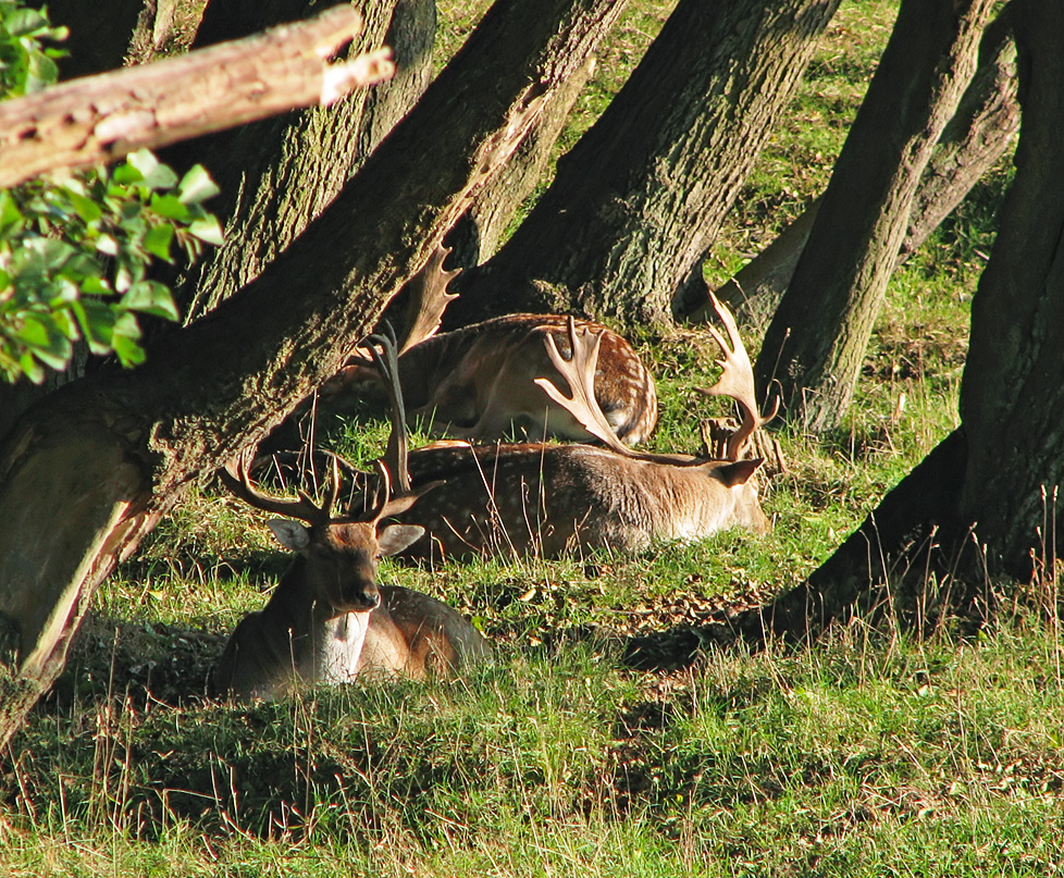 Beschreibung: Tiere des Freigeheges (Dama dama) / Putbus / Germany Fotograf: Darkone, 12. Oktober 2005